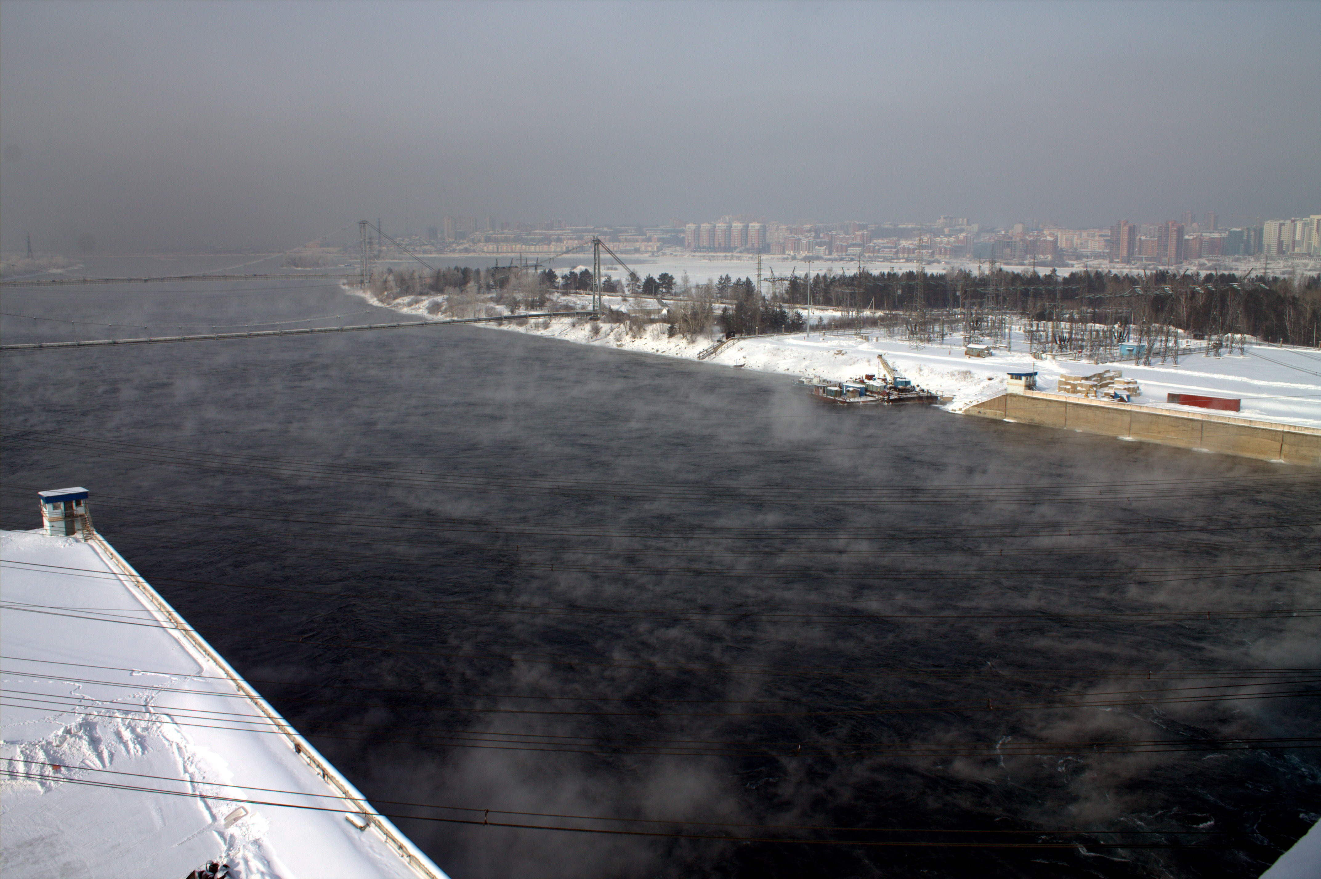 Нижний бьеф Иркутской ГЭС (отводящий канал)